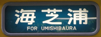 方向幕；海芝浦